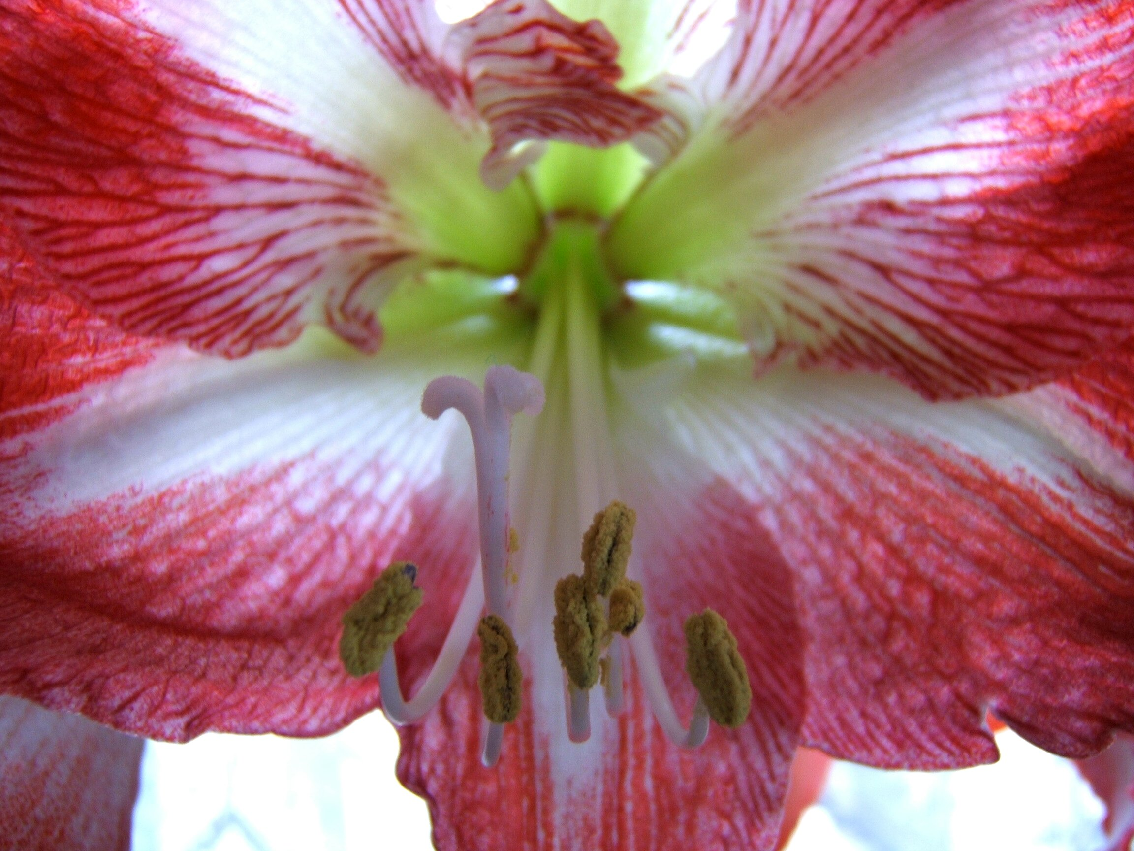 Hippeastrum meeldraden en stamper. detailopname.